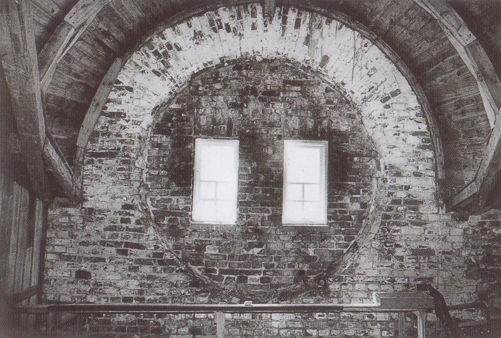 Sumusireenin suuaukko muurattiin umpeen kun sodassa vahingoittunut sumusireeni poistettiin. Kaksi ikkunaa jätettiin valaisemaan ullakkokerrosta.